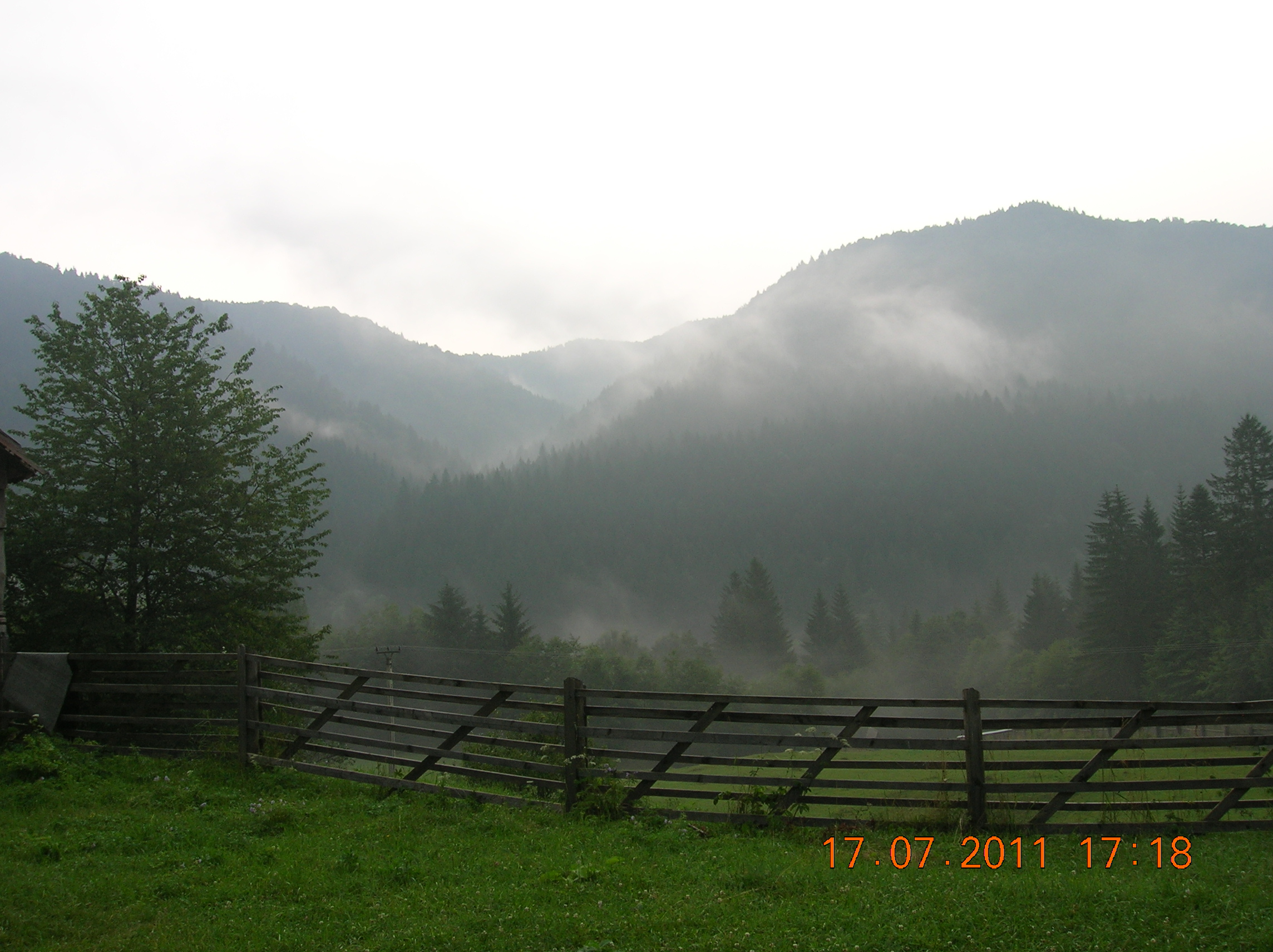 Munţii Tarcăului (Carpaţii Orientali, România)-Valea Tarcăului privită din curtea Mănăstirii Sihăstria Tarcăului